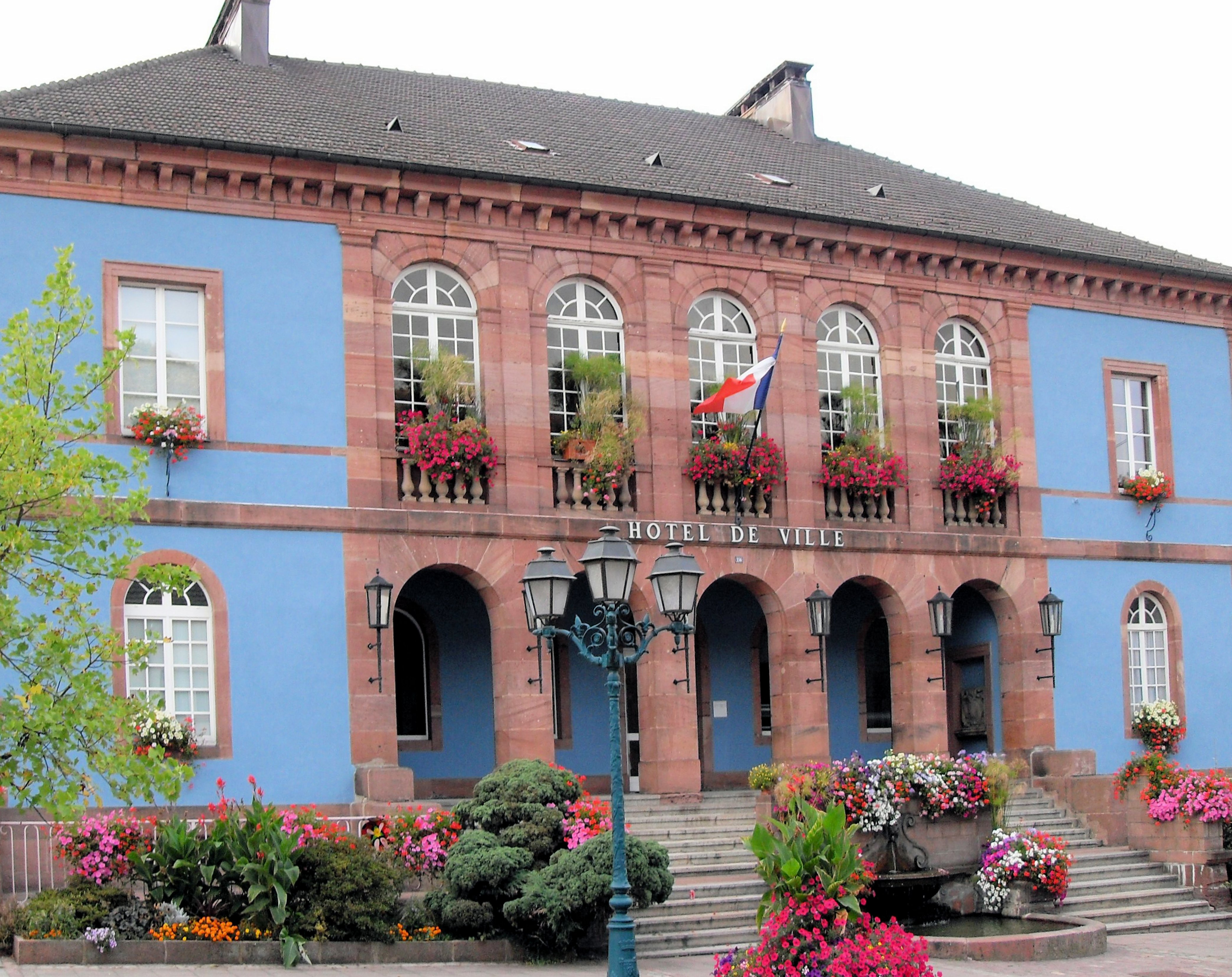 L'hôtel de ville de Sainte-Marie-aux-Mines